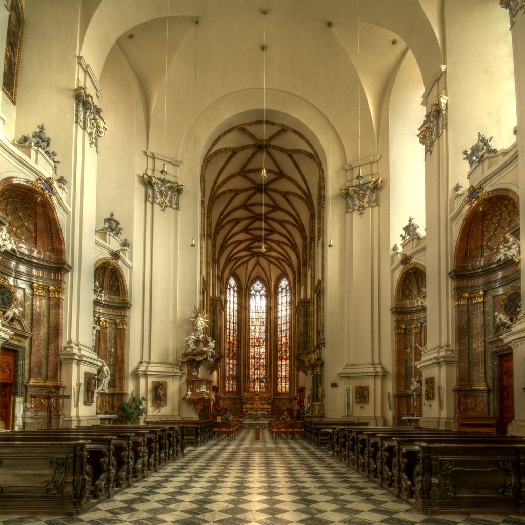 Kostel sv. Petra a Pavla, Petrov vč. děkanství, konzistoří a kanovnických rezidencí (Brno), Brno - město, Petrov 269, Brno